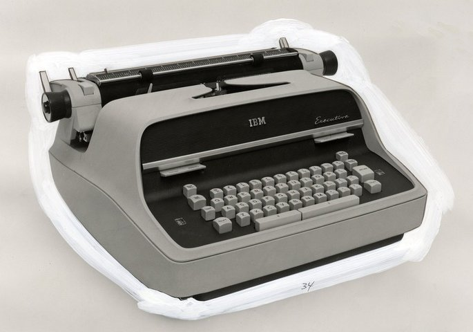 IBM elektrisk skrivemaskin modell Executive 387